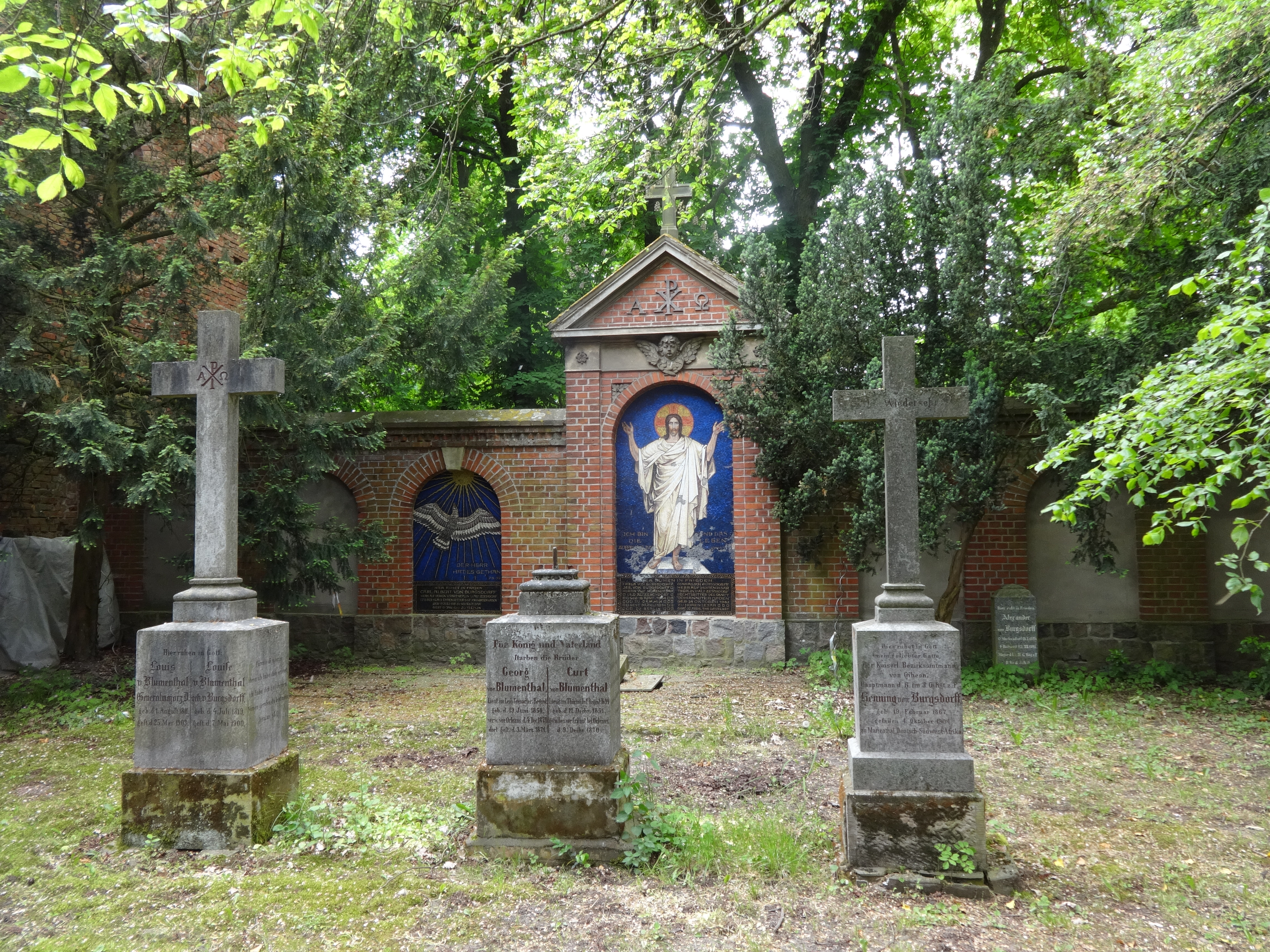 Die Dorfkirche in Hohenjesar ist eine Saalkirche, die in den Jahren 1721 bis 1723 auf dem Fundament eines mittelalterlichen Vorgängerbaus entstand. Im Zweiten Weltkrieg wurde das Bauwerk stark beschädigt und verfiel in den darauffolgenden Jahrzehnten. Zwar konnte die Kirchengemeinde den Turm im Jahr 1965 instandsetzen, das Dach wurde jedoch abgetragen und 2007 durch ein Notdach ersetzt. Seit Anfang des 21. Jahrhunderts bemüht sich ein Heimatverein um die Wiederherstellung.